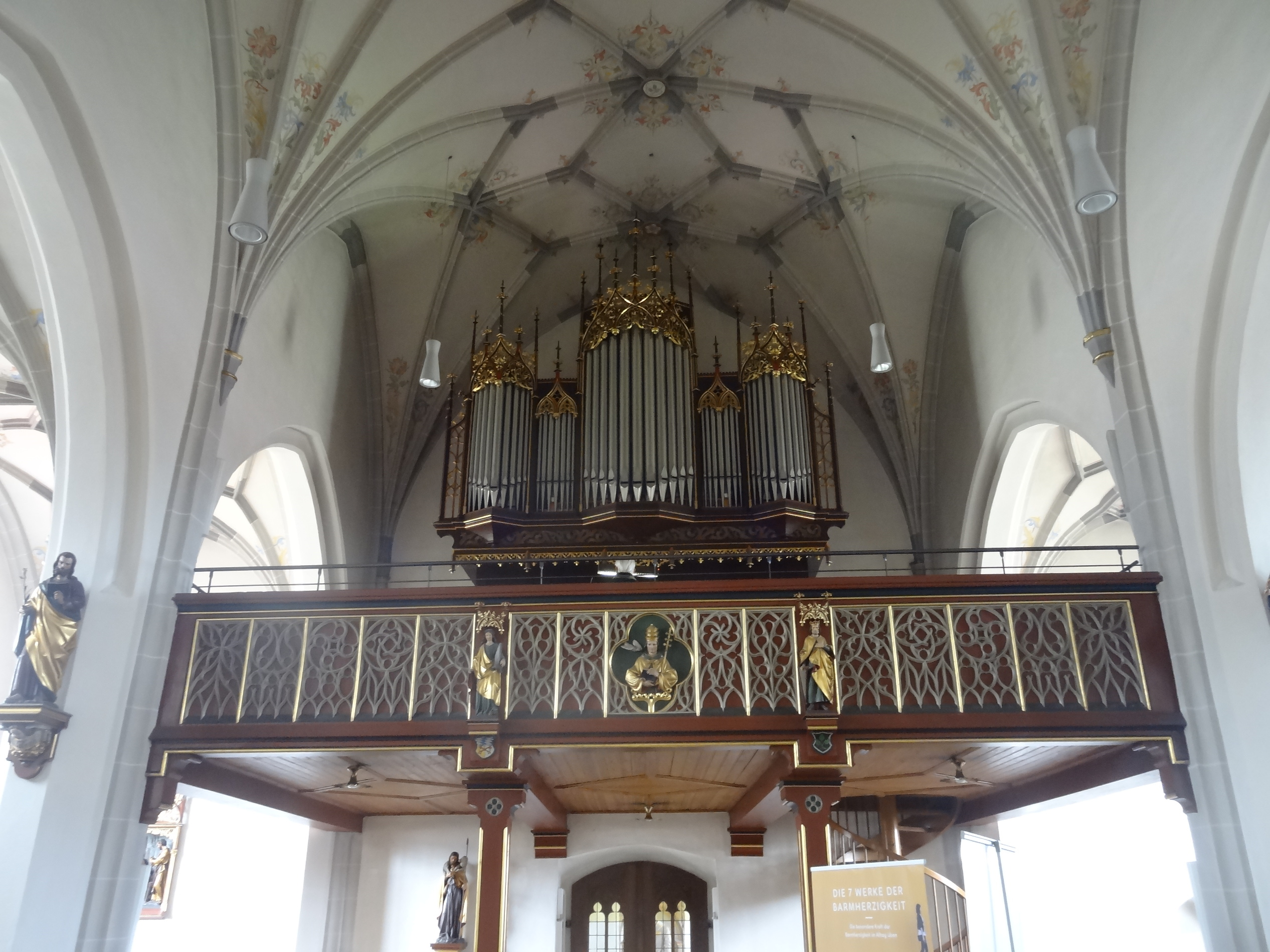 Westempore mit Orgel der Pfarrkirche St. Peter in Velden an der Vils (Lkr. Landshut)